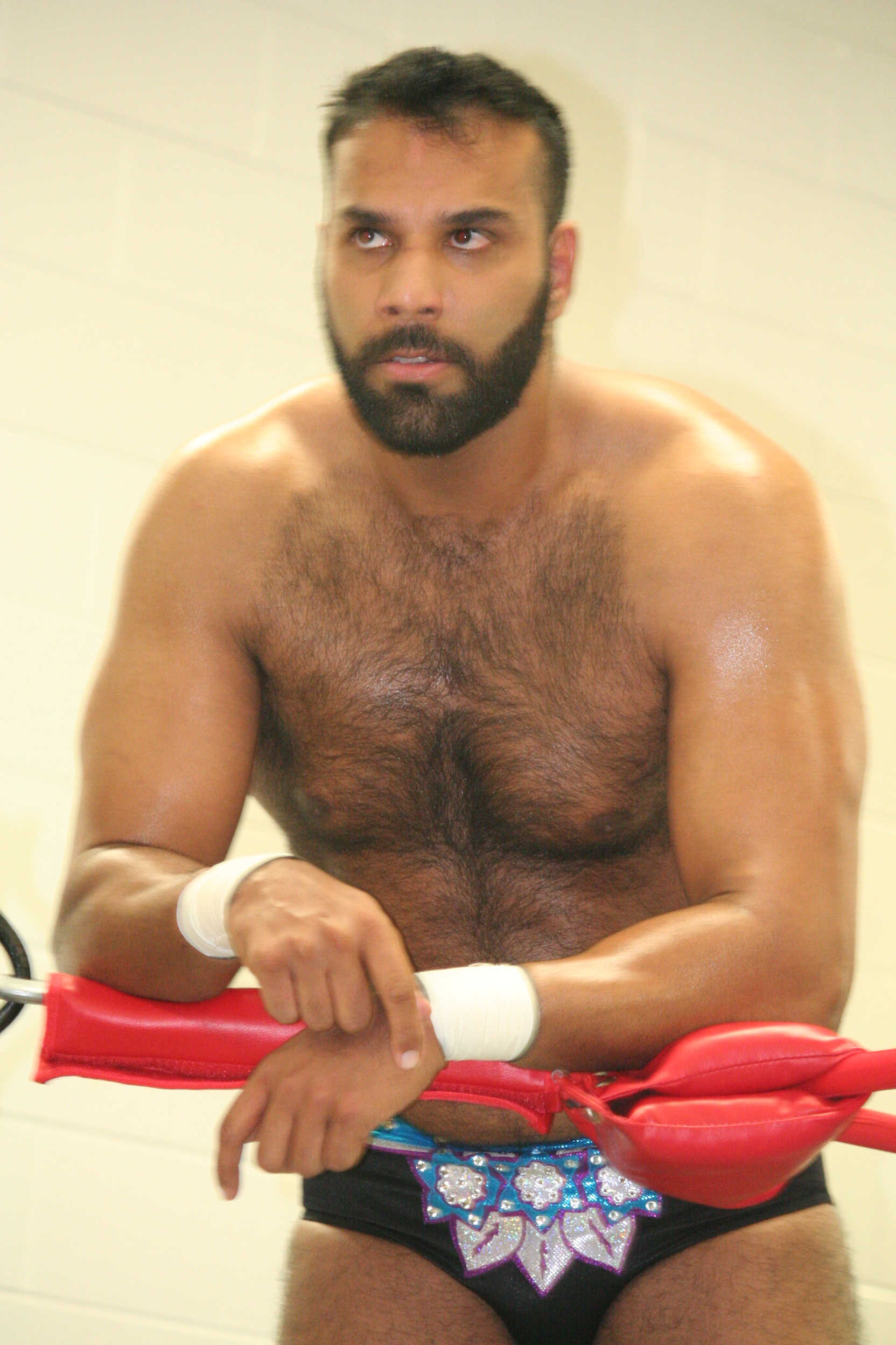 Jinder Mahal en novembre 2015